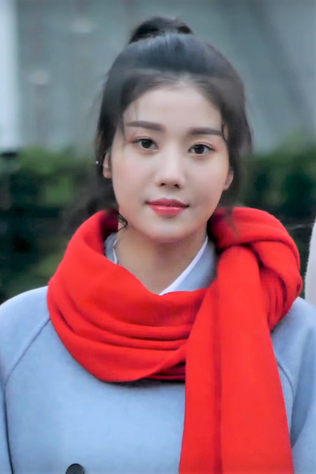 11월 2일 오전 서울시 영등포구 여의도 KBS 신관 공개홀에 KBS ‘뮤직뱅크(MUSICBANK)’ 리허설을 위해 아이돌이 출근을 하고 있다.